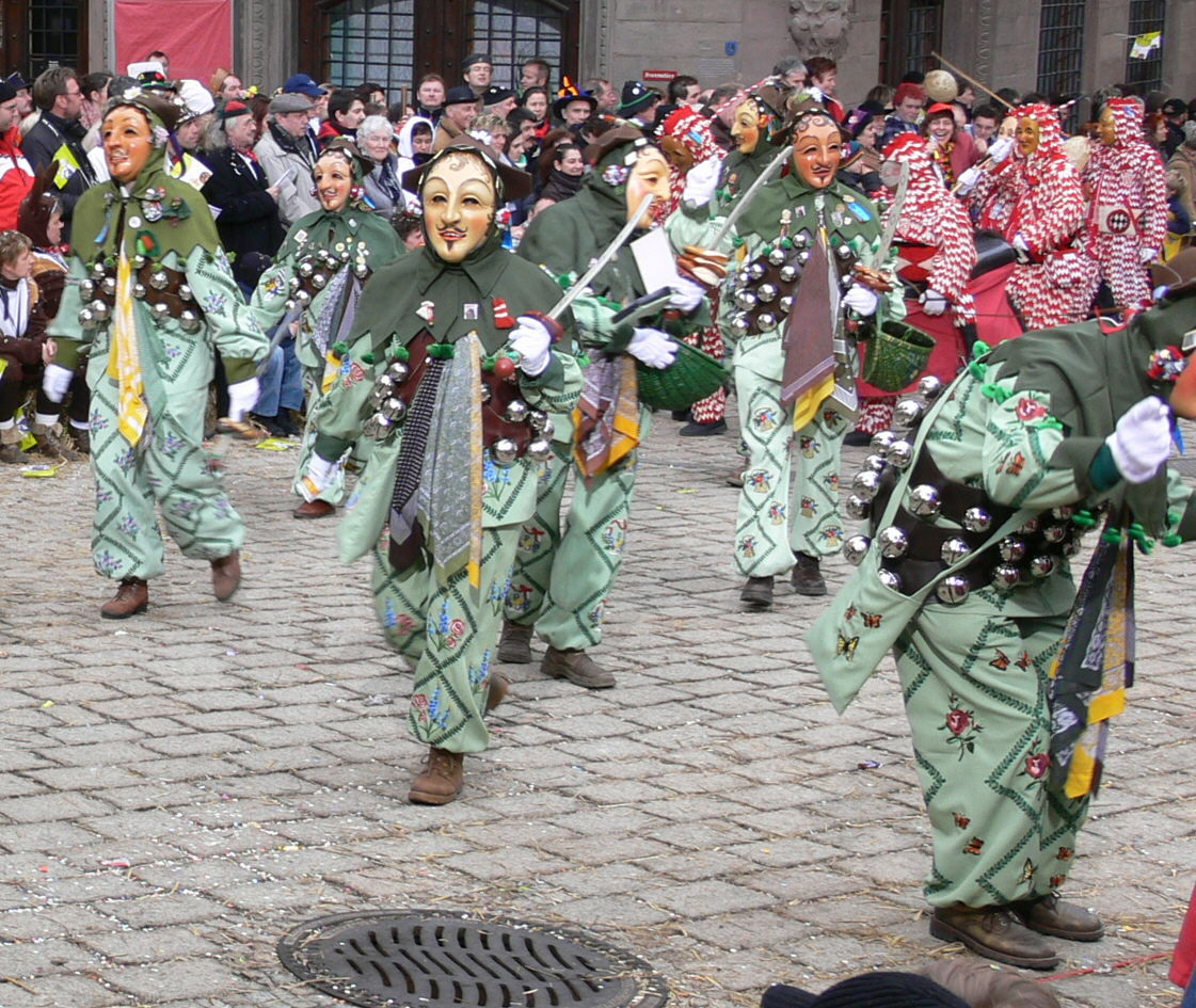 Plätzlerzunft Weingarten, Figur: Schlösslenarr Veranstaltung: Narrensprung beim Narrentreffen Meßkirch 2006